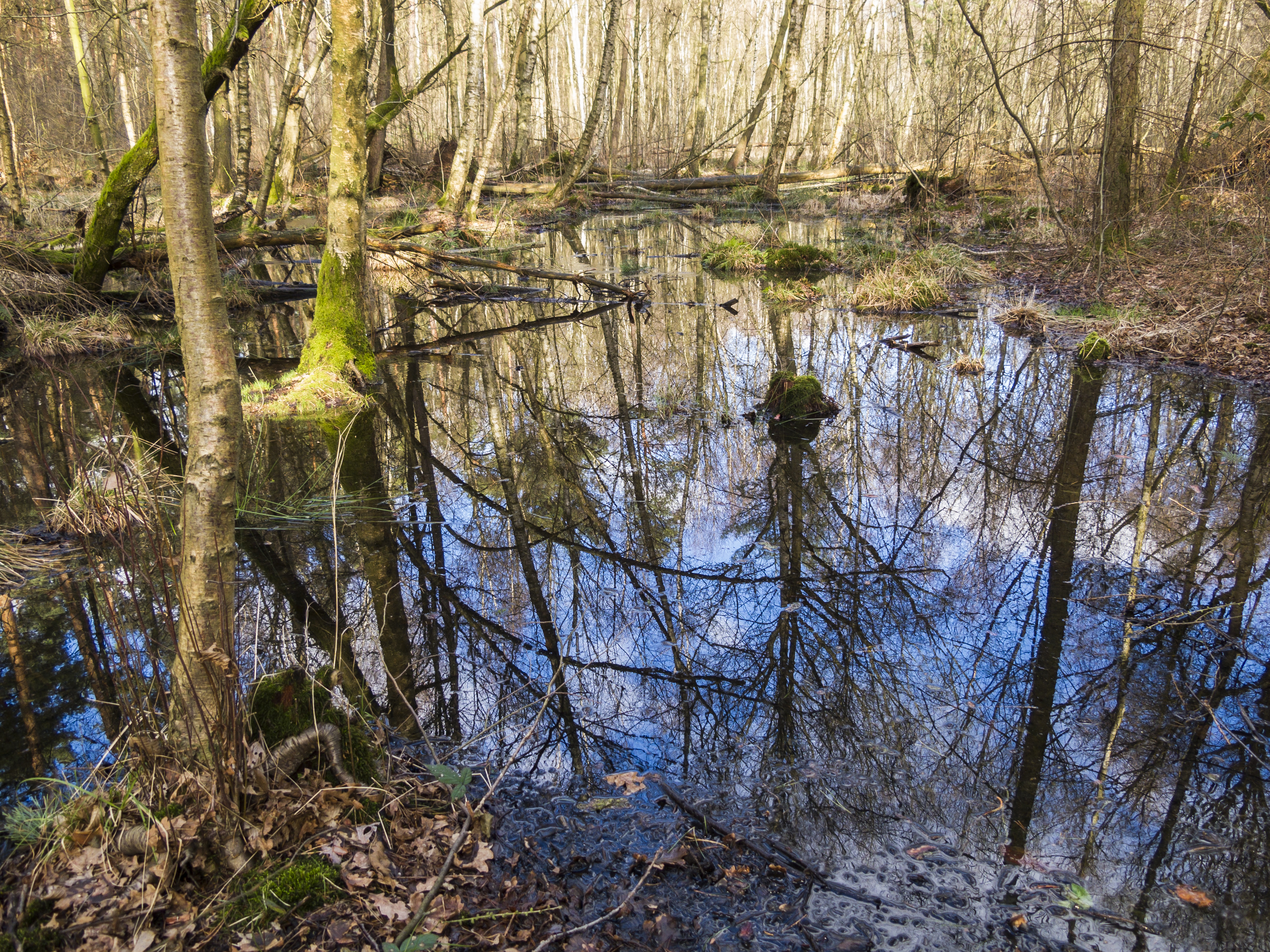 Braunschweig, Querumer Forst. Das kleine Quellmoor ist zusammen mit einem mäandrierenden, periodischen Bachlauf als Naturdenkmal ND-BS23 ausgewiesen. Schutzzweck ist die Erhaltung und ungestörte Weiterentwicklung des ökologisch wertvollen Moores zum Moorbirken-Erlen-Bruchwald sowie die Erhaltung eines seltenen Winkelseggen-Erlensaumes.